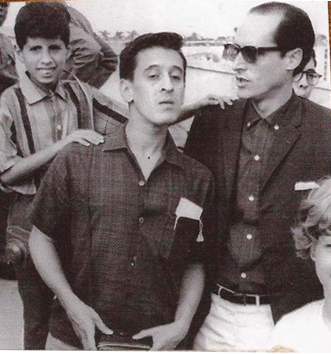 El periodista salvadoreño Roque Dalton junto al ensayista cubano Roberto Fernández Retamar (a la derecha) en La Habana.